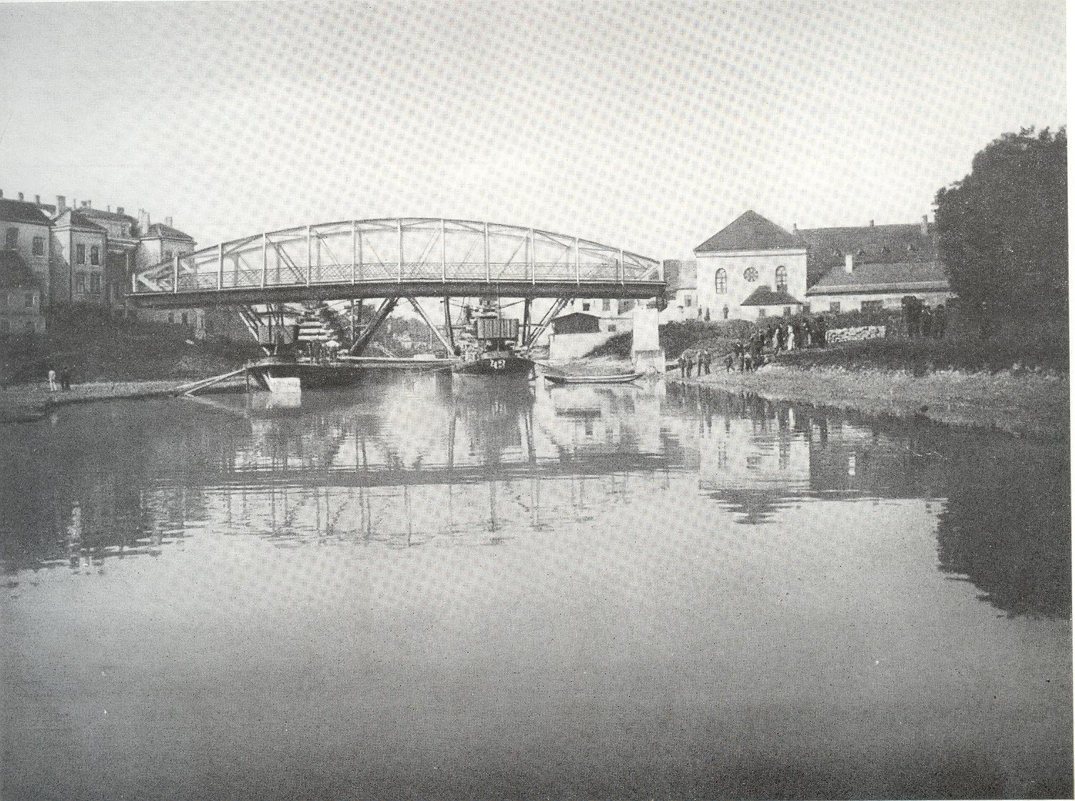 A Rábca hídjának áthelyezése